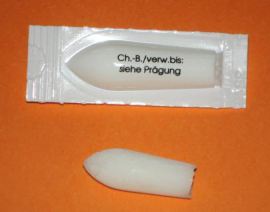 Zwei rektale Suppositorien (Zäpfchen), eins davon noch verpackt